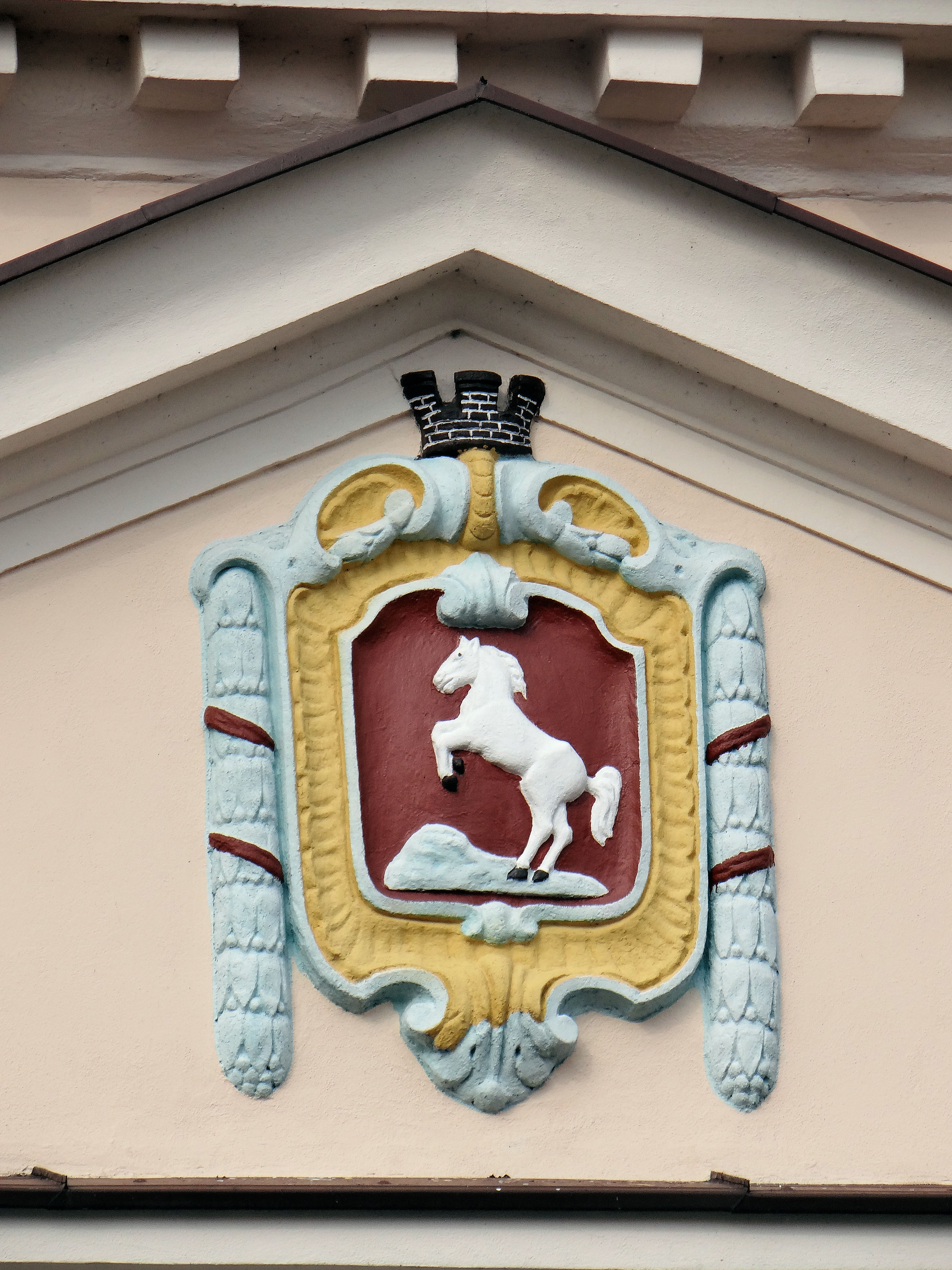 Ratusz w Koninie - herb miasta